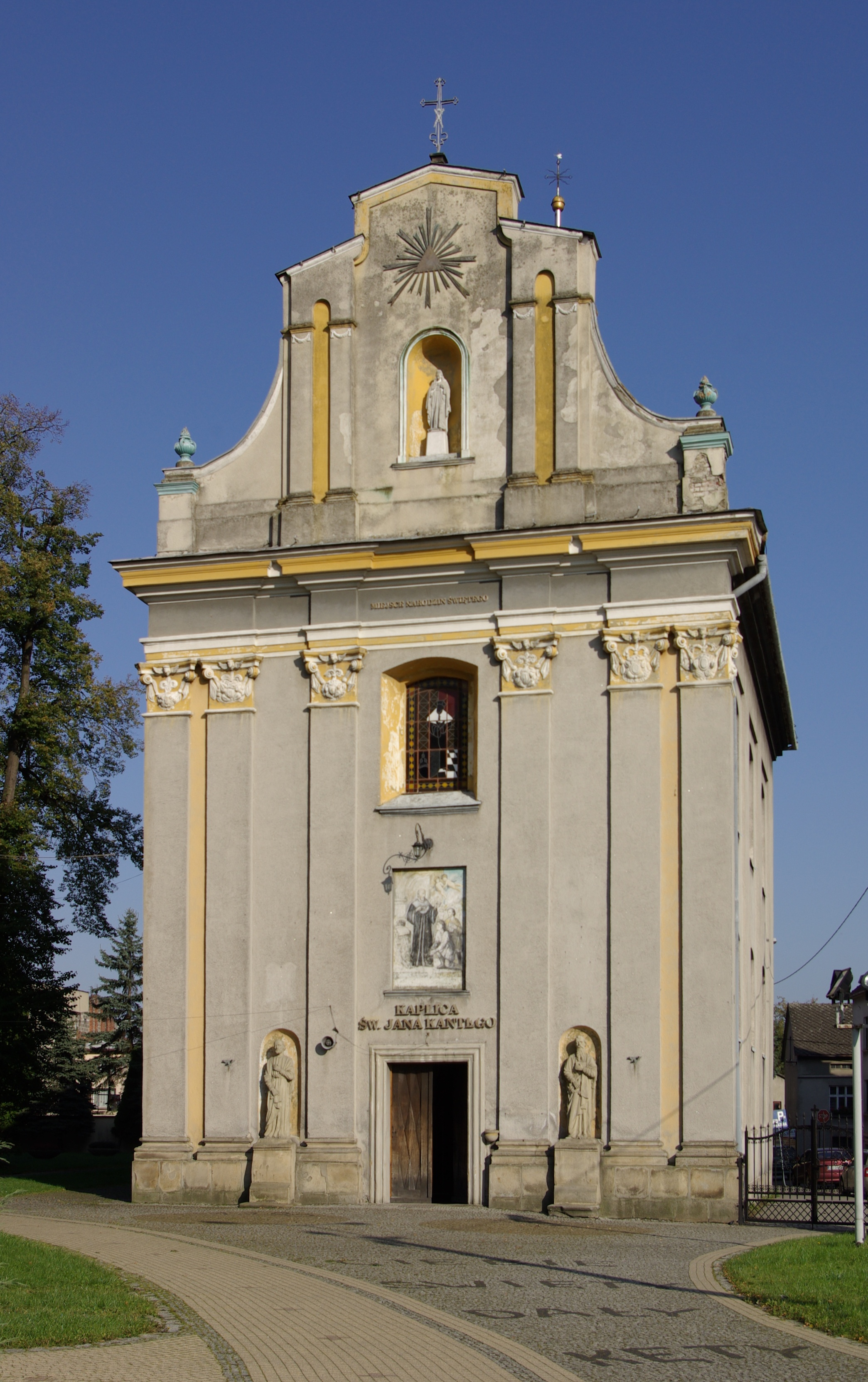 Kaplica św. Jana Kantego w Kętach